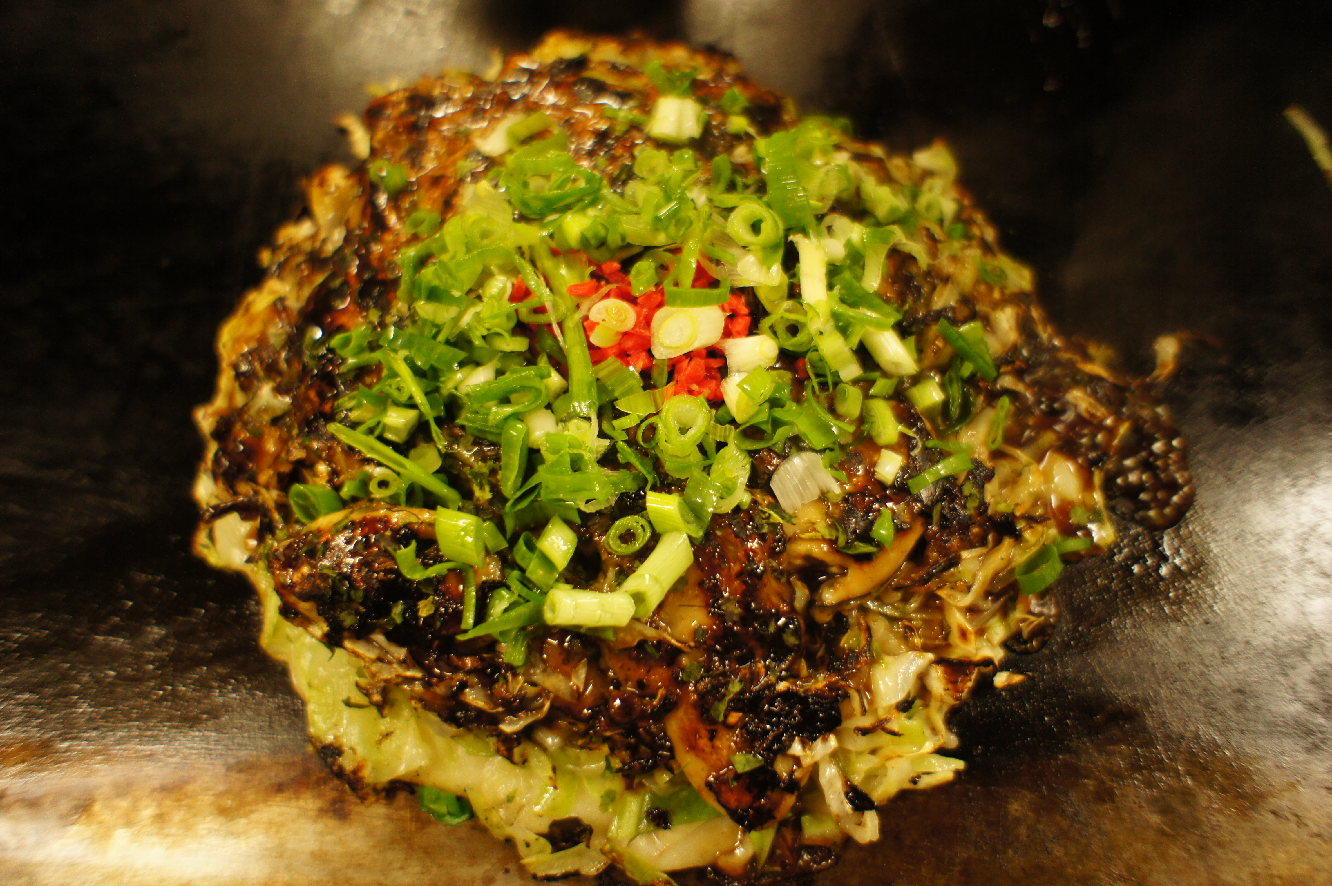 日生のカキオコ